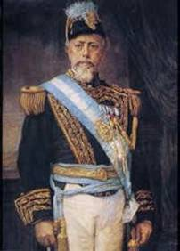 Gen. Pte. Alejo Julio Argentino Roca